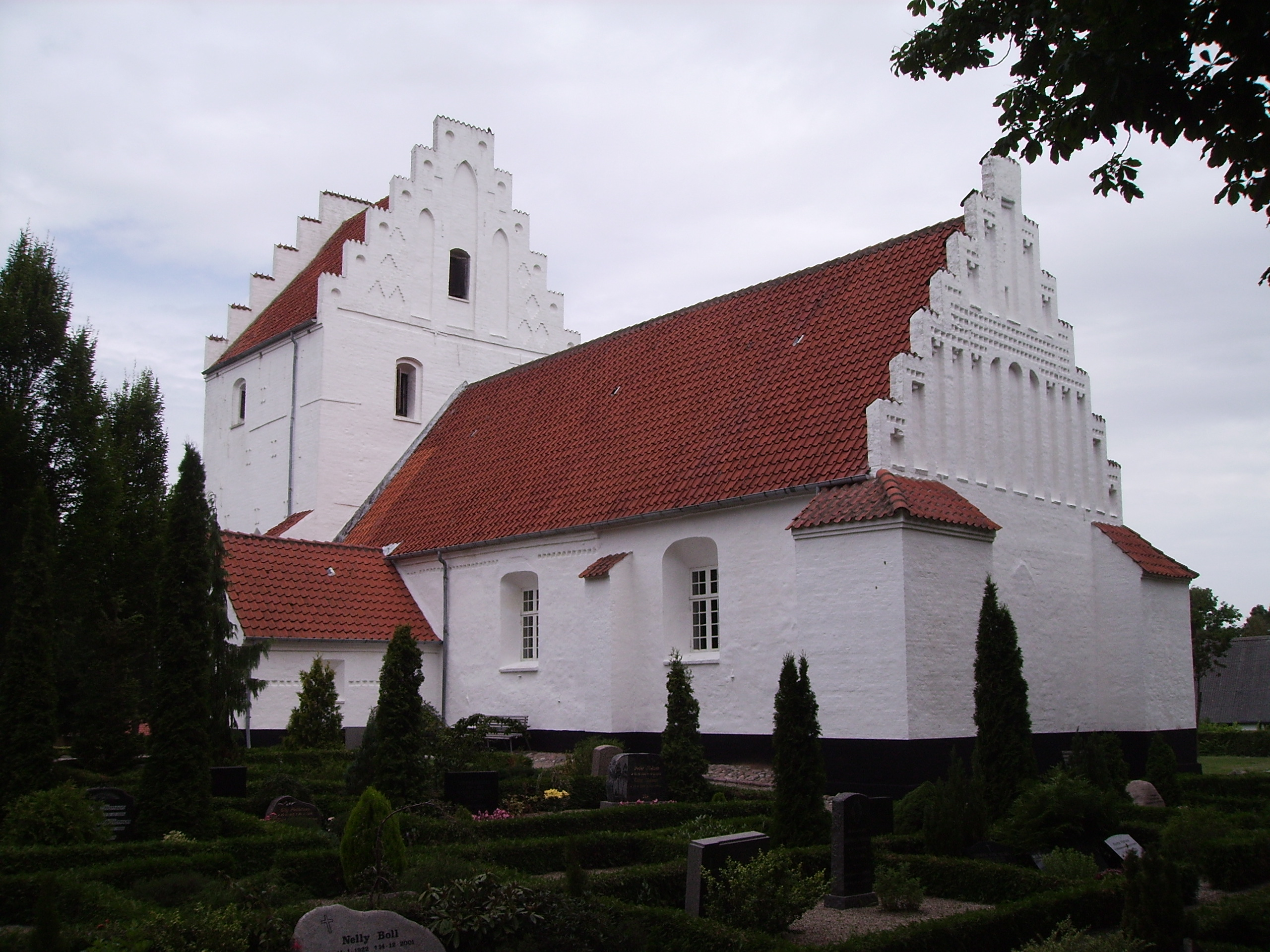 Næsbyhoved-Broby Kirke, Næsbyhoved-Broby Sogn, Odense Herred, Odense Amt, Denmark (Danish Church) - Næsbyhoved-Broby Kirke fra sydøst